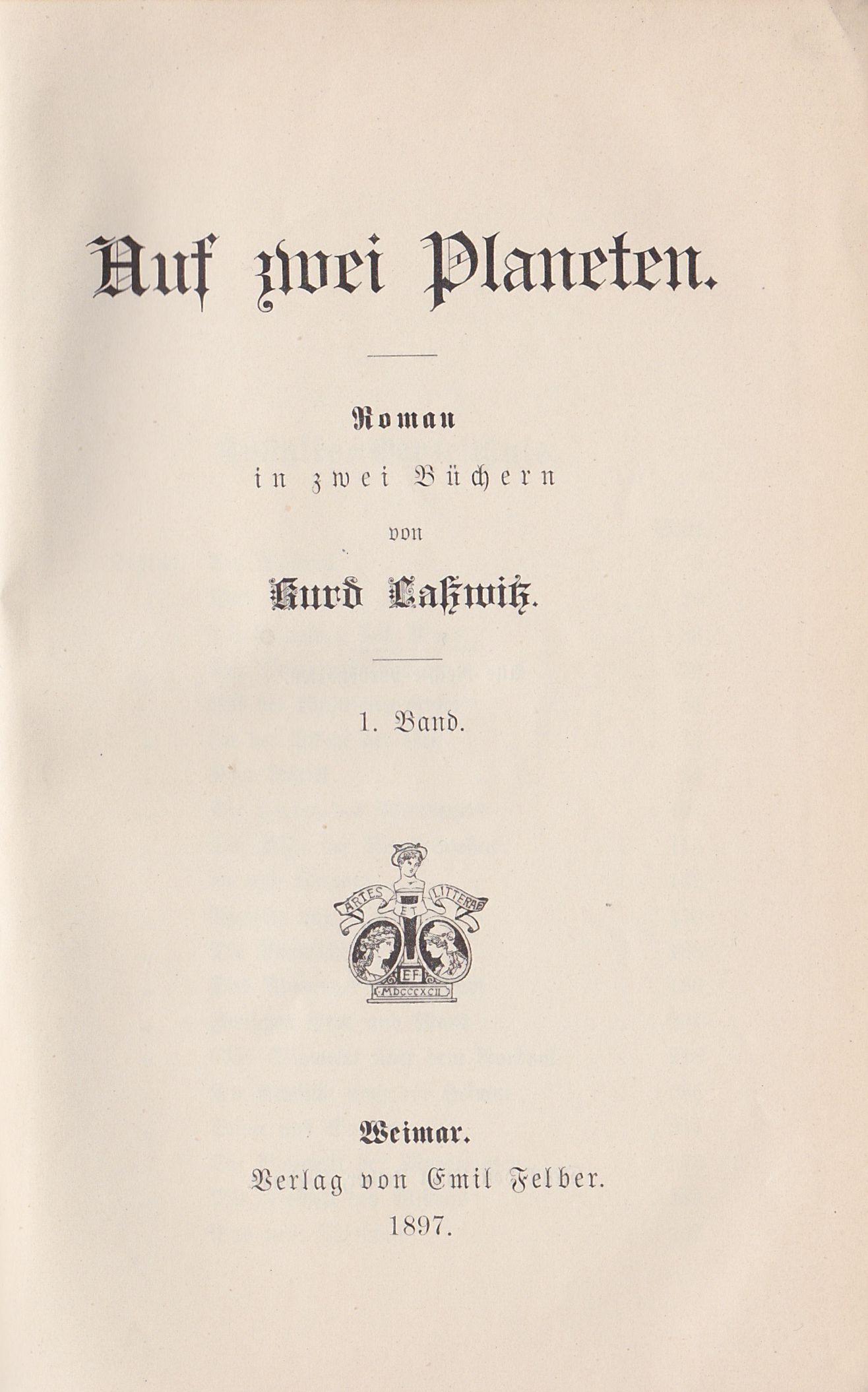 Kurt Laßwitz: Auf zwei Planeten, von 1897, Titelseite